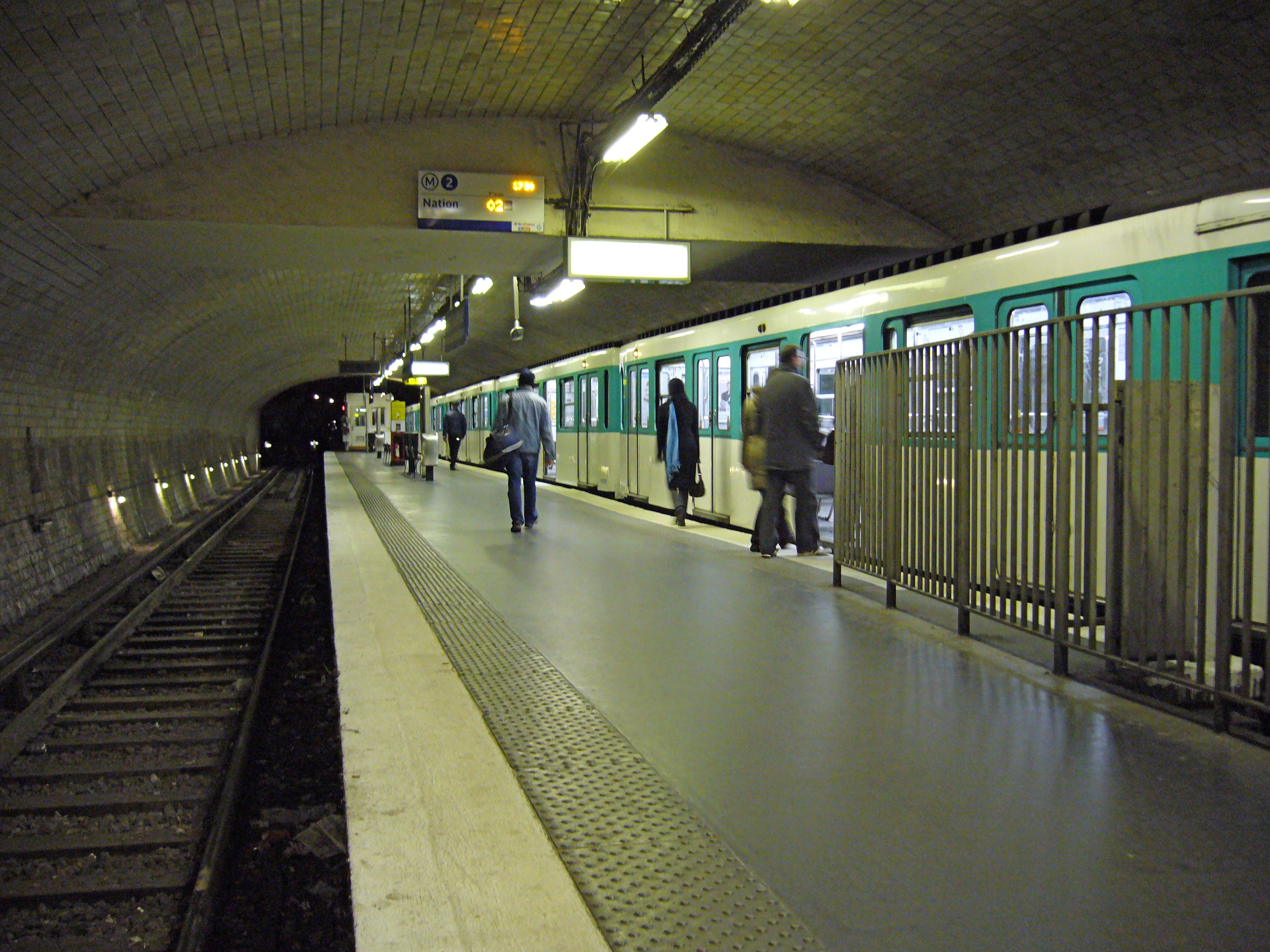 Quai de départ de la station Porte Dauphine sur la ligne 2 du métro de Paris.